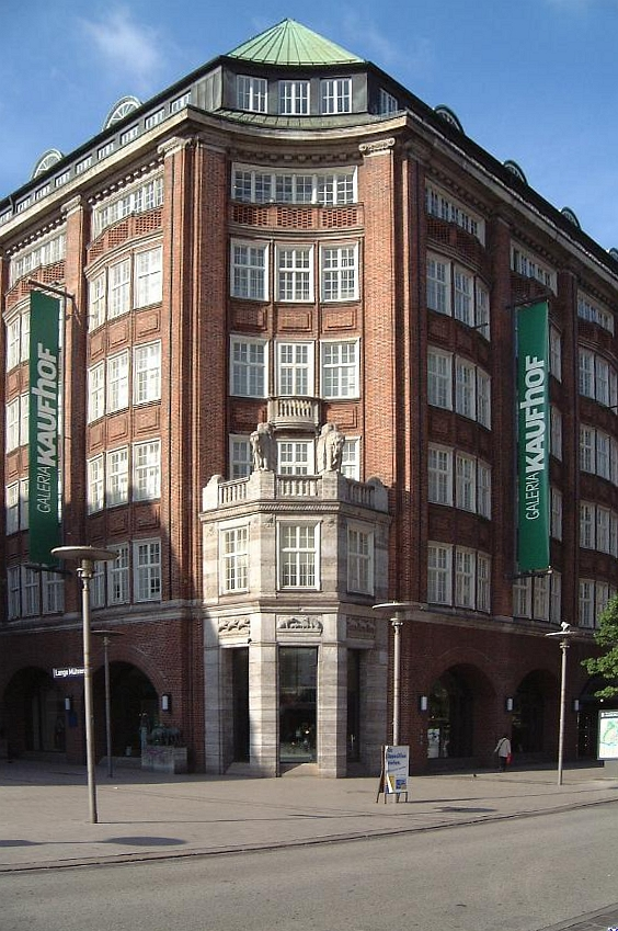 Klöpperhaus Hamburg, Mönckebergstraße 3 Architekt: Fritz Höger (1911)